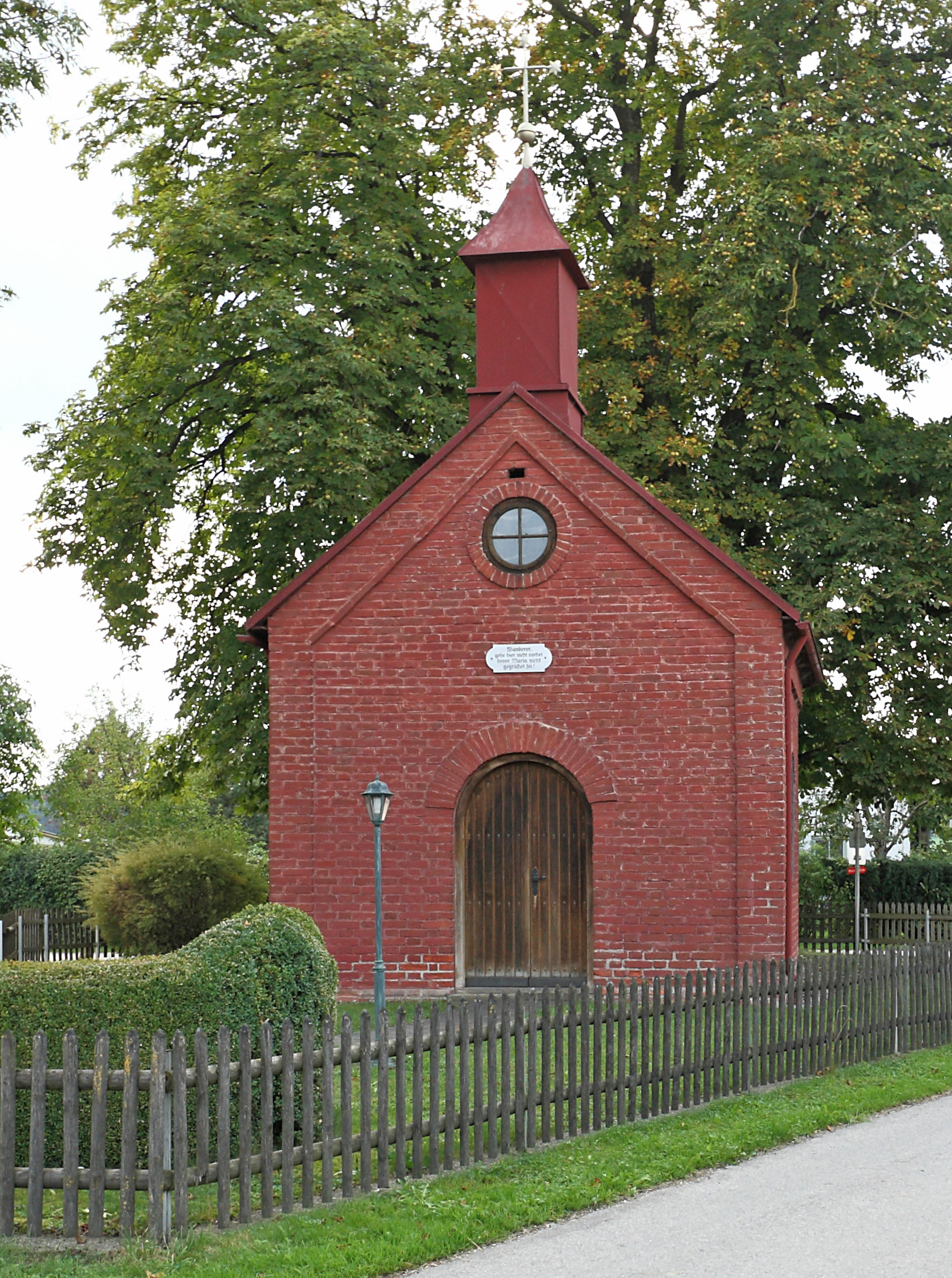 Ostansicht